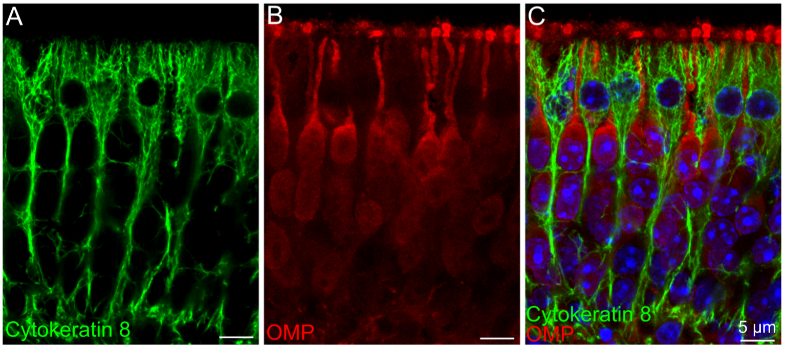 Fig. 4. Marcadores de células de sostén.